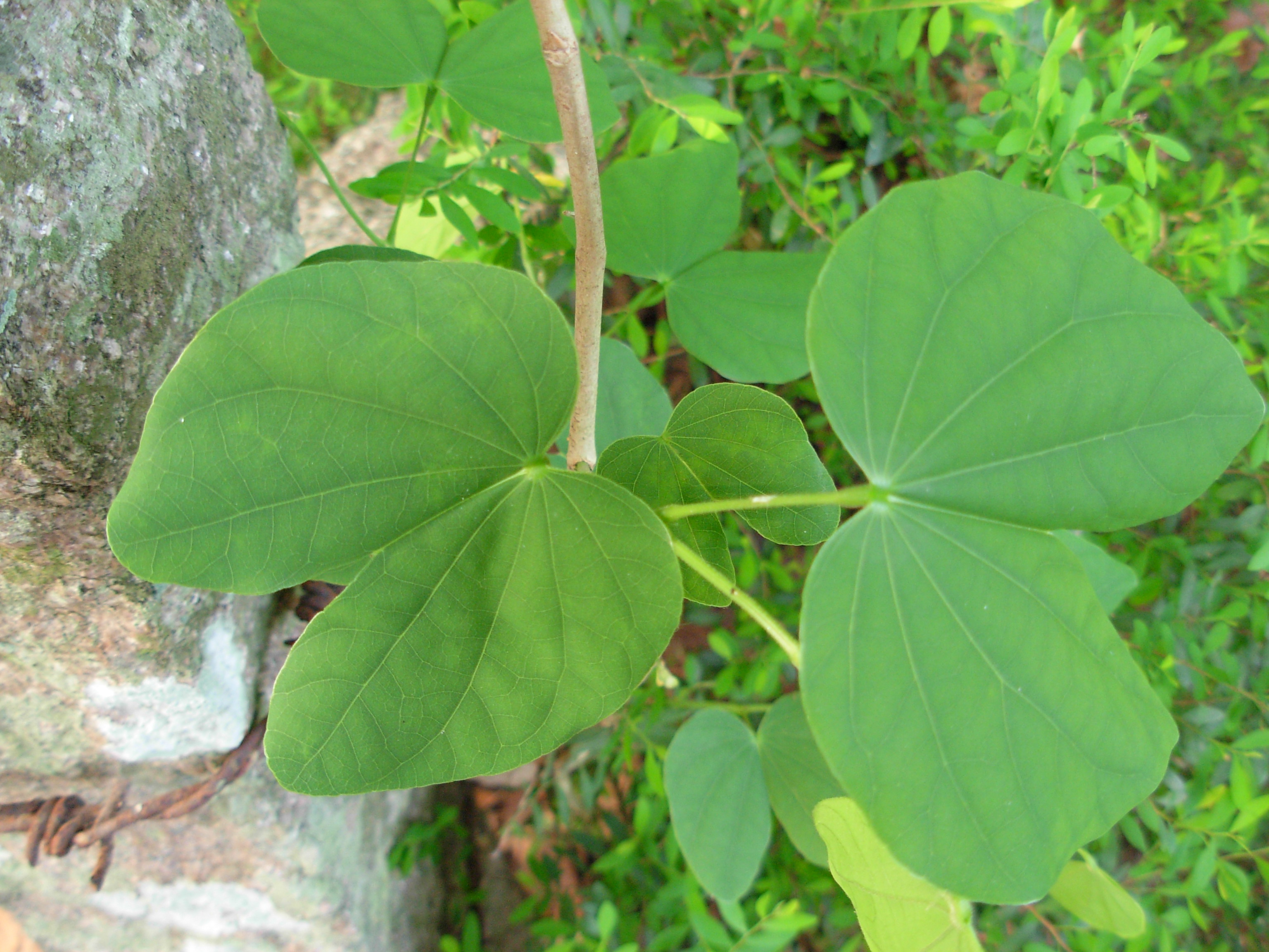 മന്ദാരംഇല